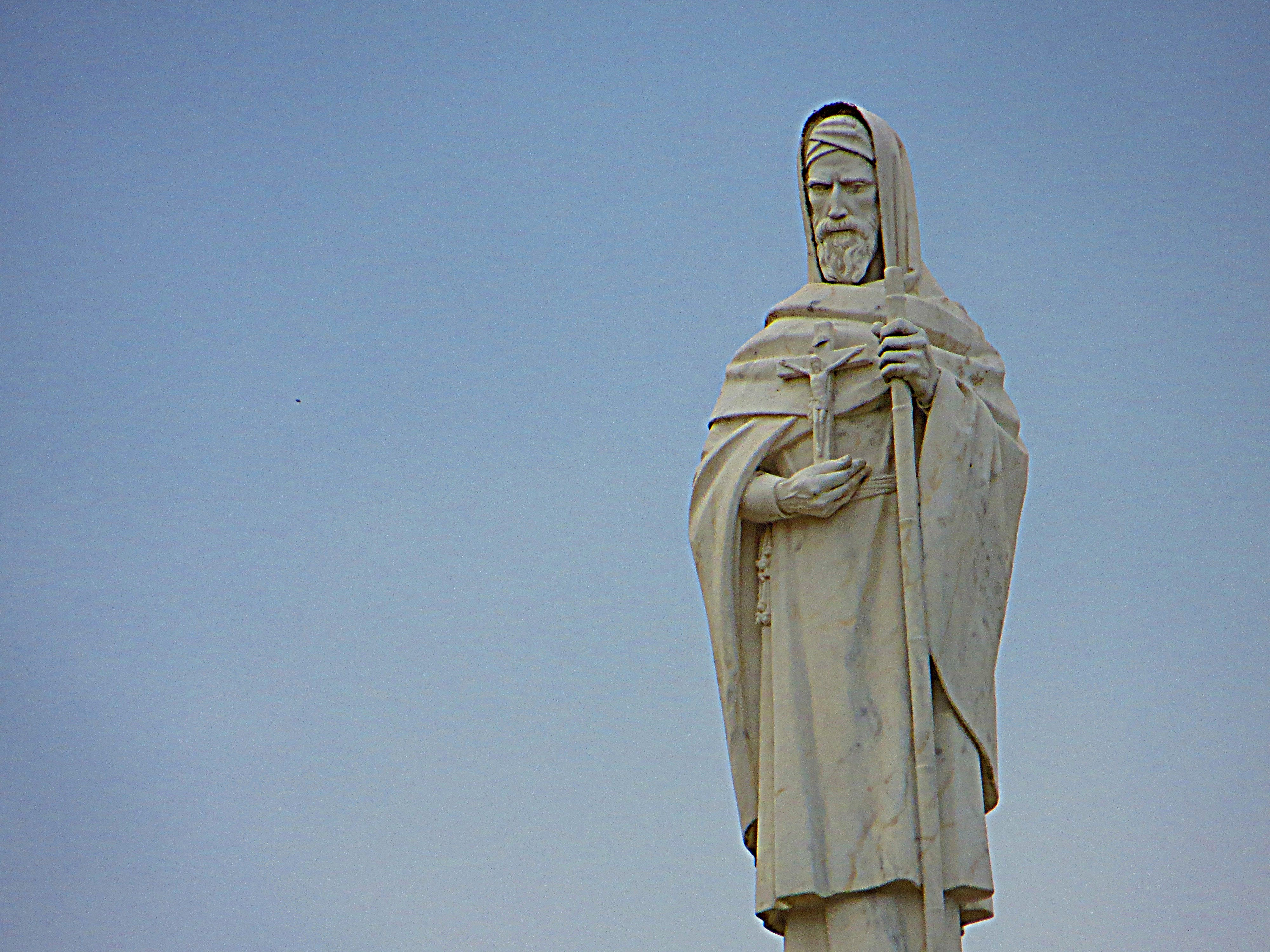 Estátua do mártir São João de Brito sobre a colunata da Basílica de Nossa Senhora do Rosário no Santuário de Fátima